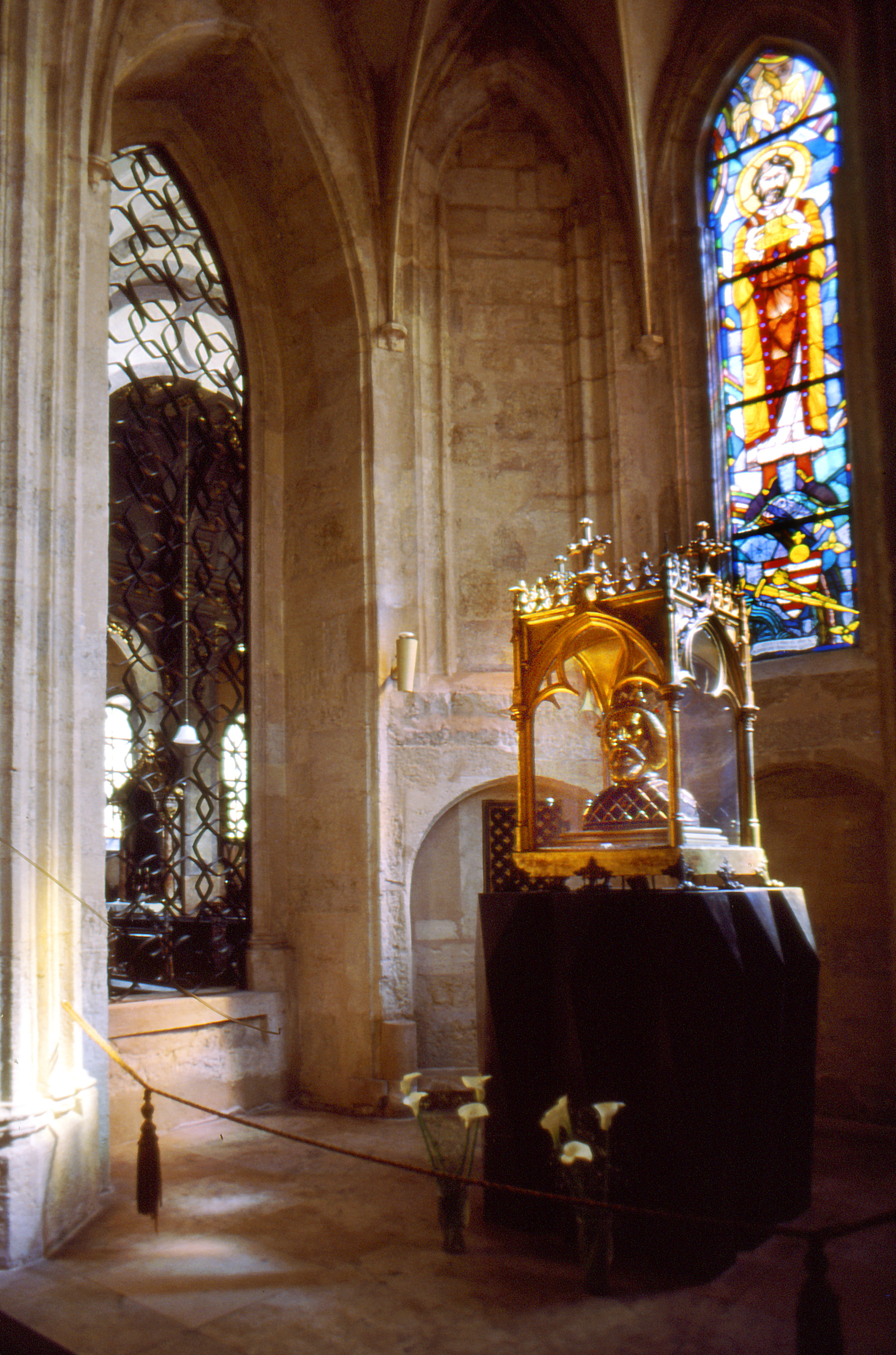 Szent László hermája a győri bazilikában